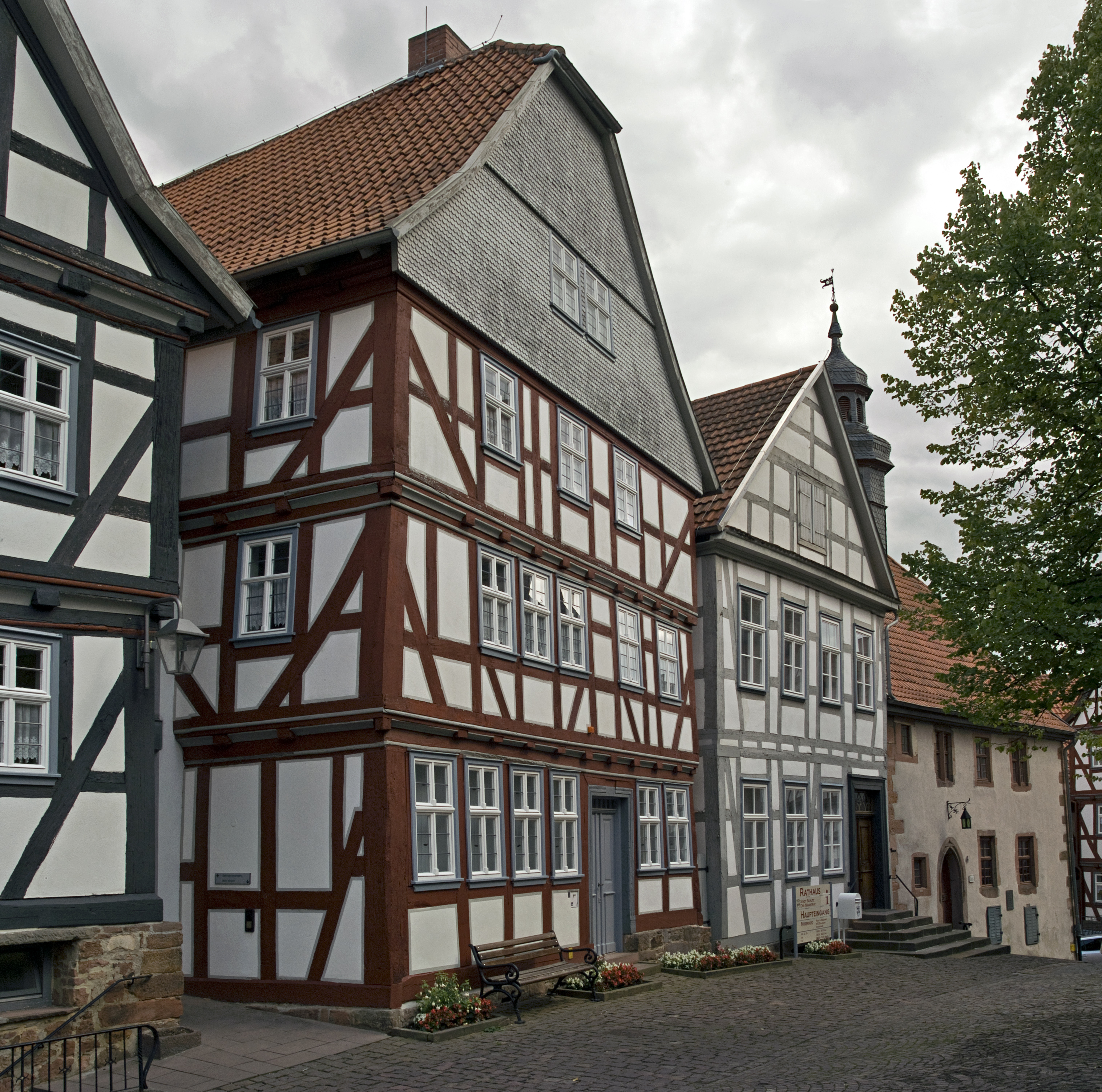 Rathaus